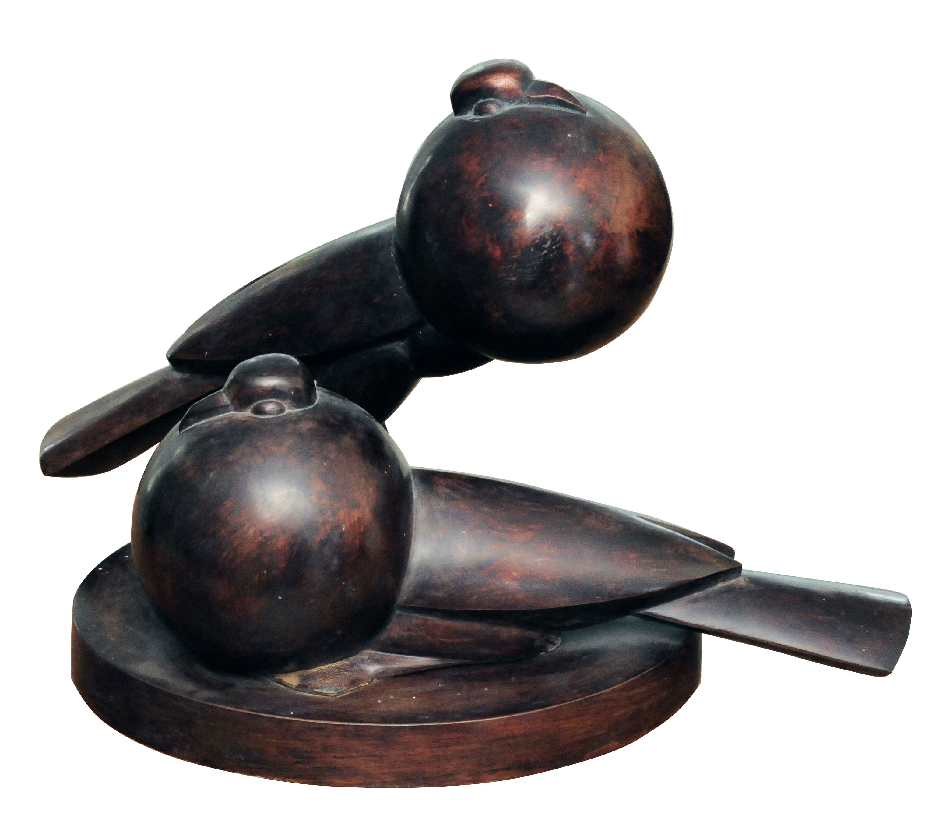 sculpture de Béla Vörös (1899-1983)